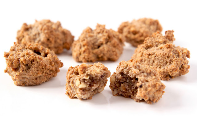 Brutti ma buoni - biscuits italiens